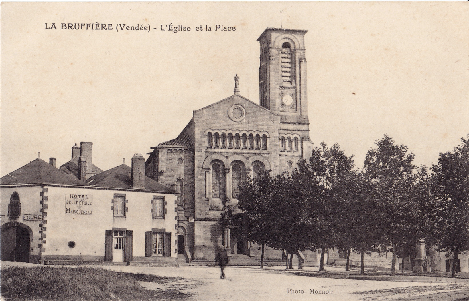 Carte postale ancienne éditée par Monnoir : LA BRUFFIERE - L'Eglise et la Place